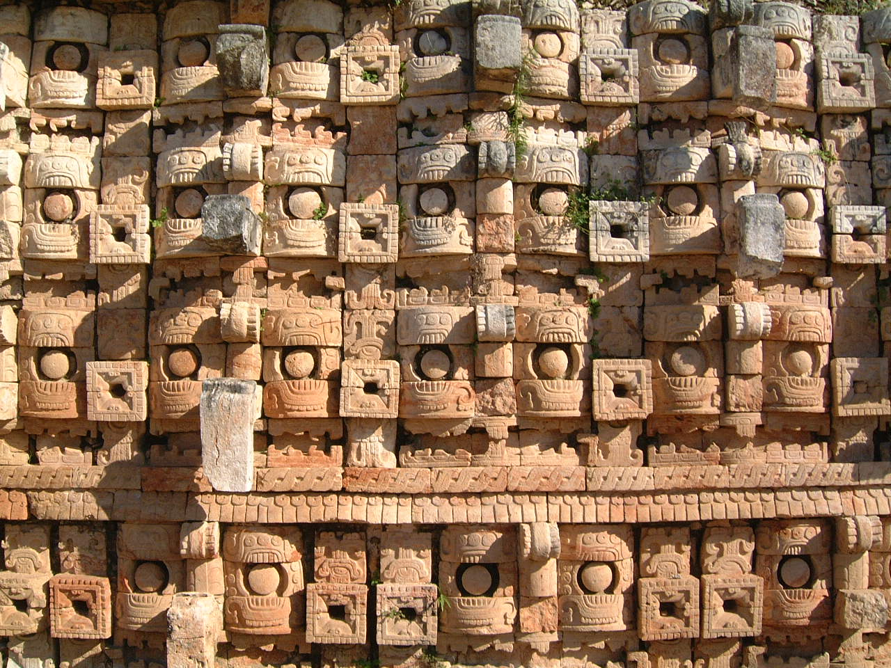 Codz Poop in Kabah Yucatan Mexico